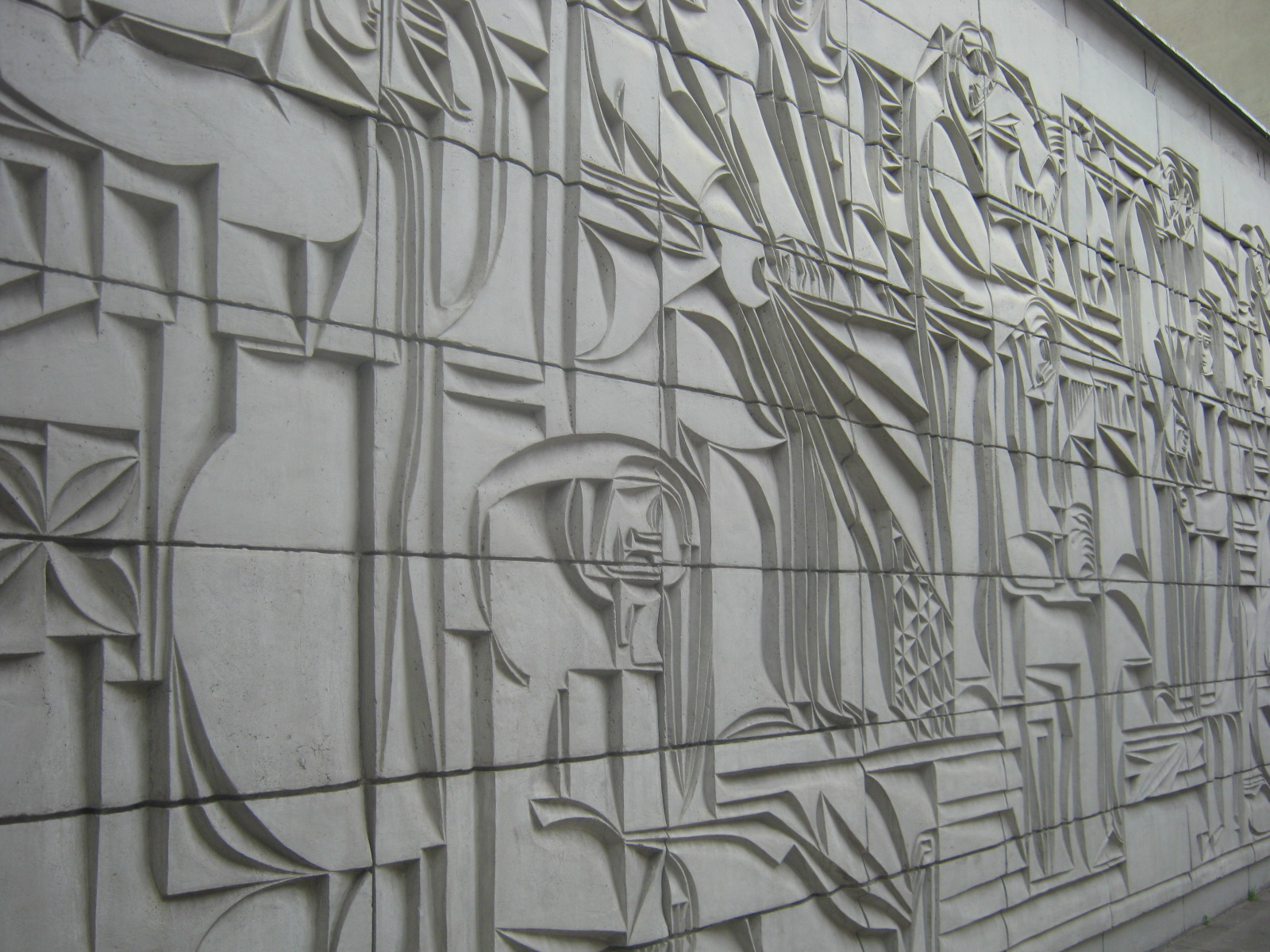 Vilnius